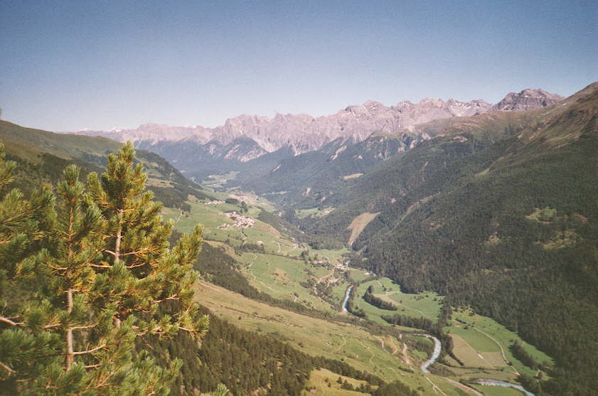 Unterengadin (Original text : Ort: oberhalb Lavin, September 2001)